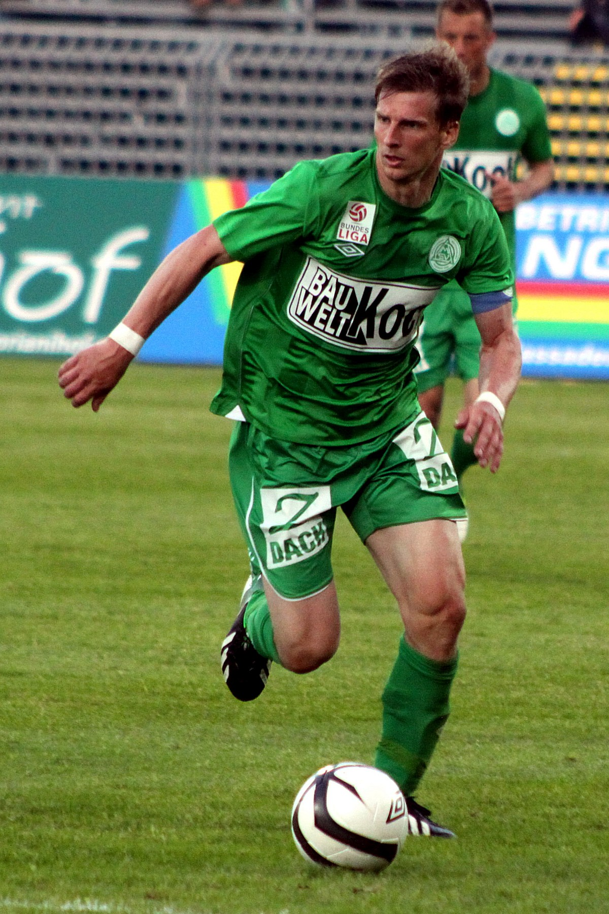 Meisterschaftsspiel der österreichischen Bundesliga: SV Mattersburg gegen SK Rapid Wien am 18. Mail 2013 (2:0)] im Mattersburger Pappelstadion.] - Das Foto zeigt Michael Mörz (SV Mattersburg).